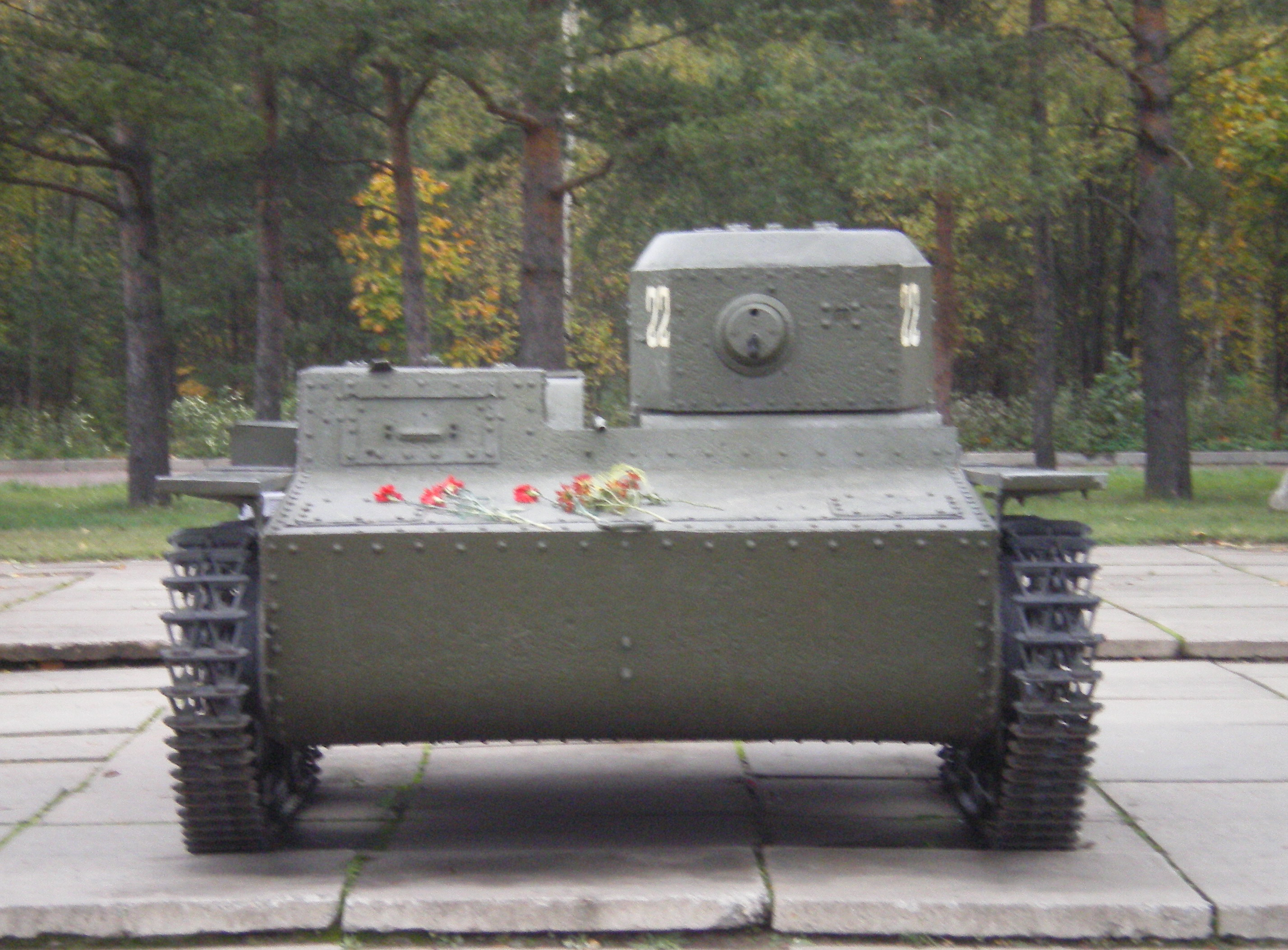 Танк Т-38. Вид спереди. Диорама «Прорыв блокады Ленинграда». Экспозиция военной техники периода 1941–1944 годов под открытым небом.